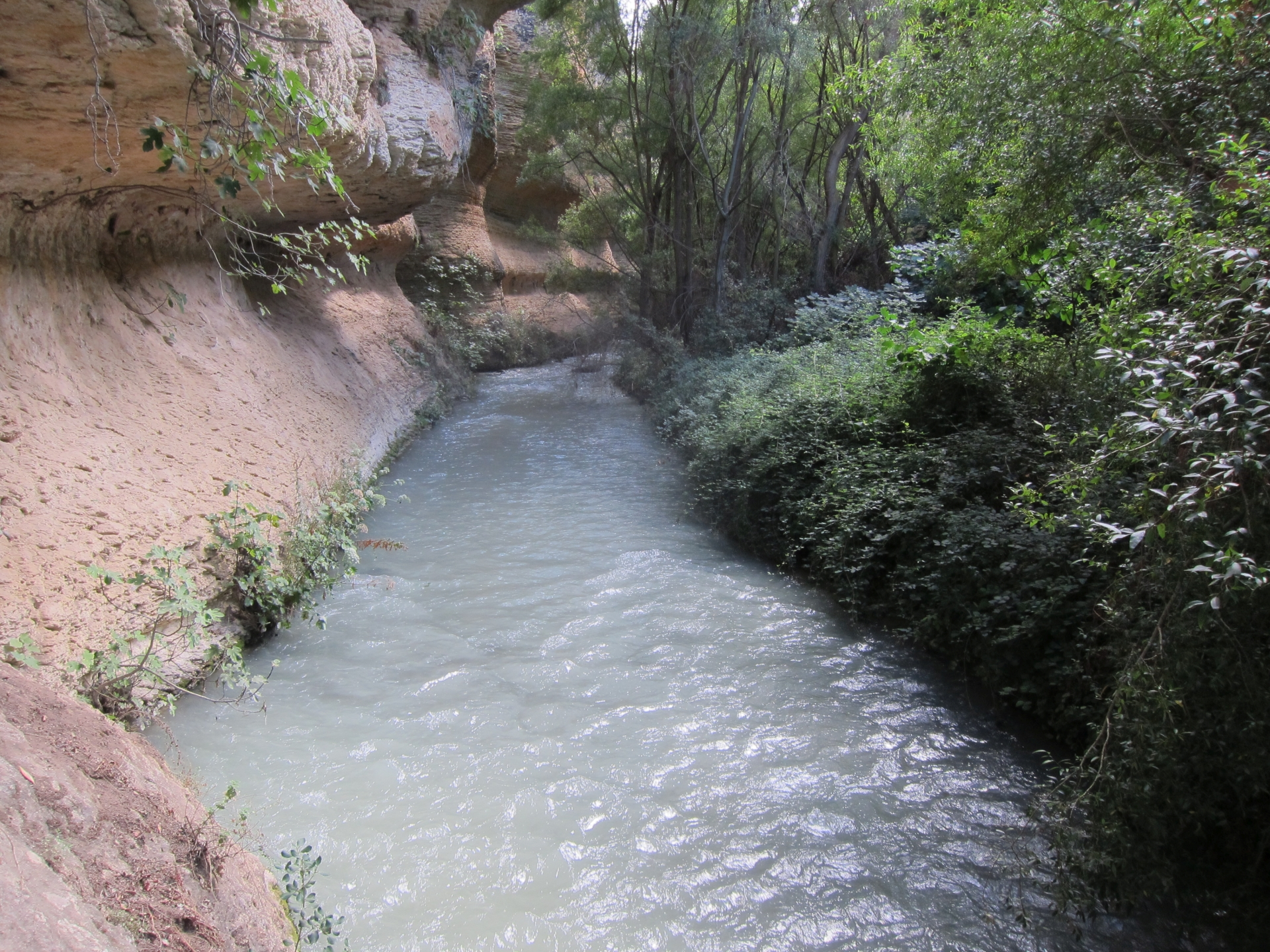 Tajo de los Bermejales